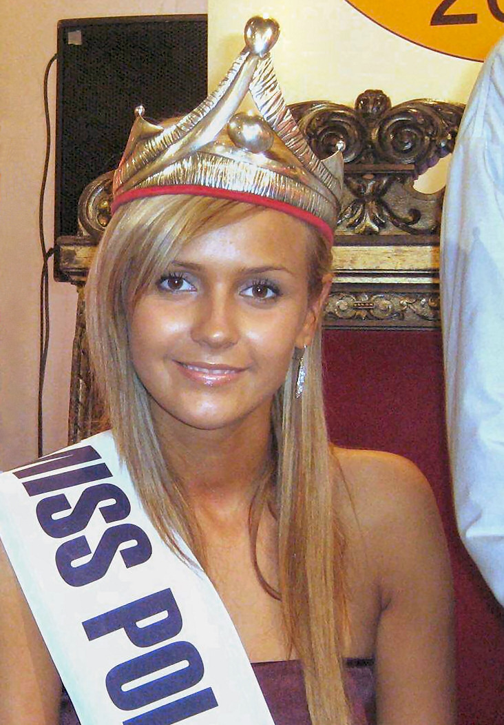 Angelika Jakubowska - zwyciężczyni konkursu Miss Polonia 2008